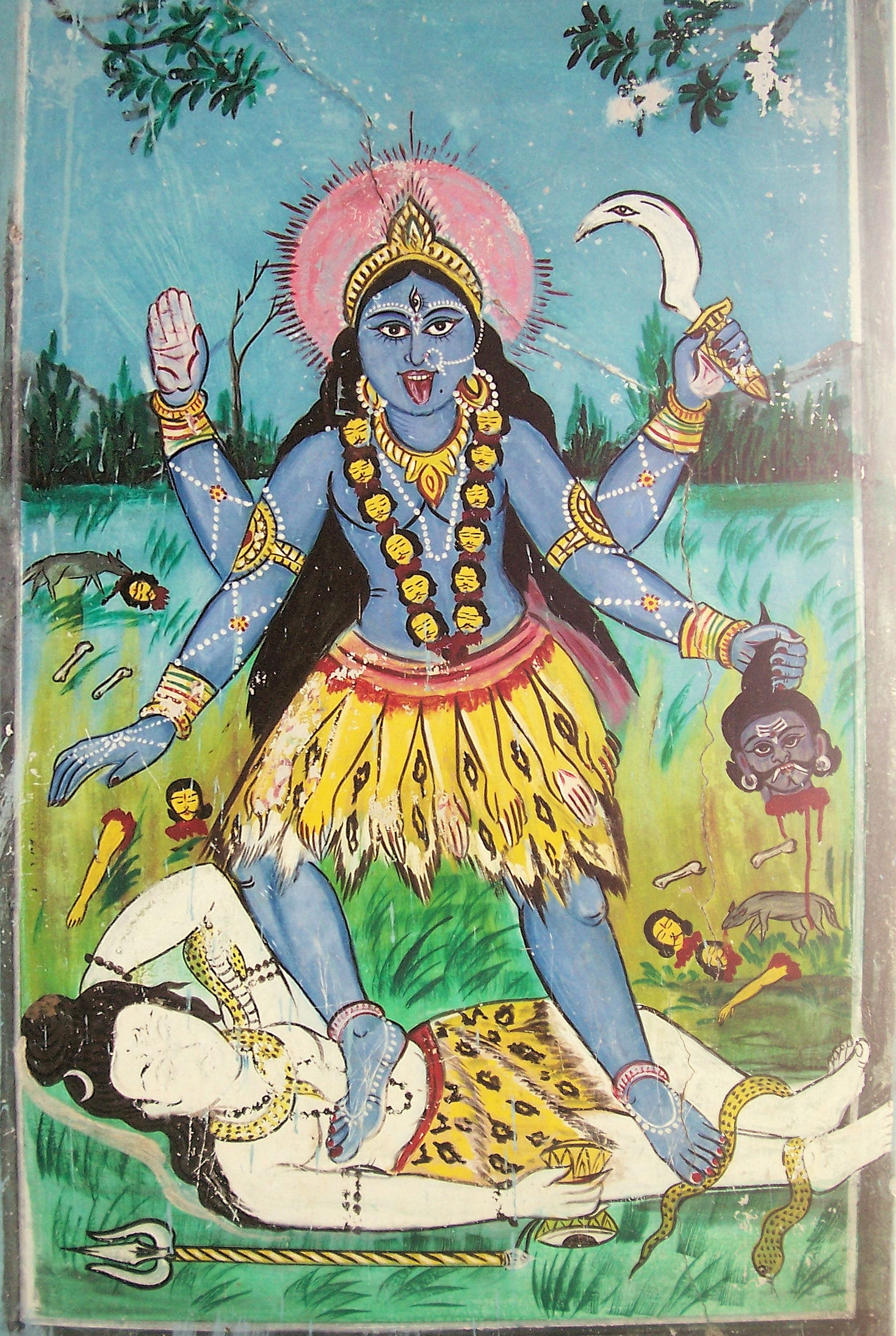 Godess Kali Painting